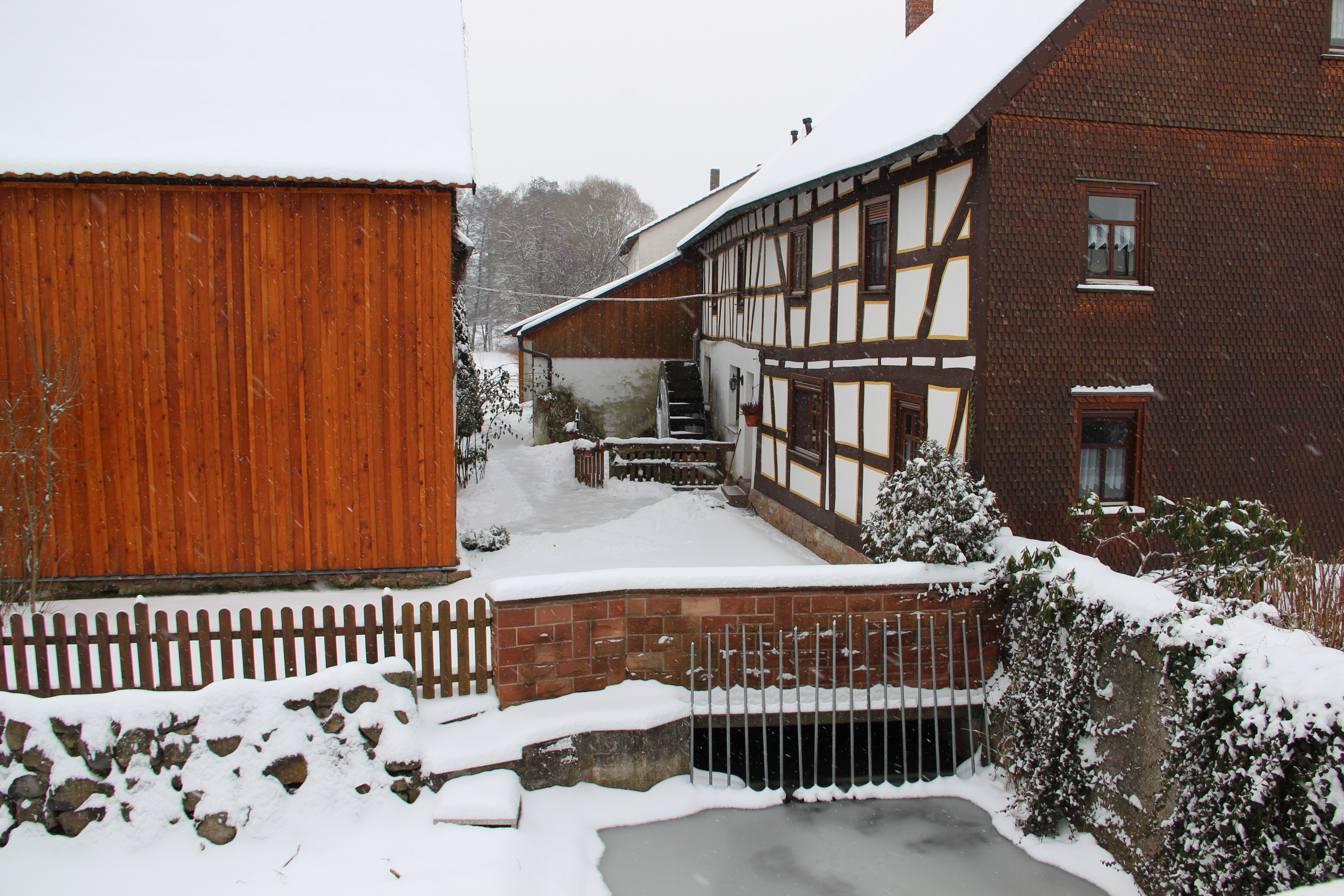 Hainzell; Stegmühle mit Eis